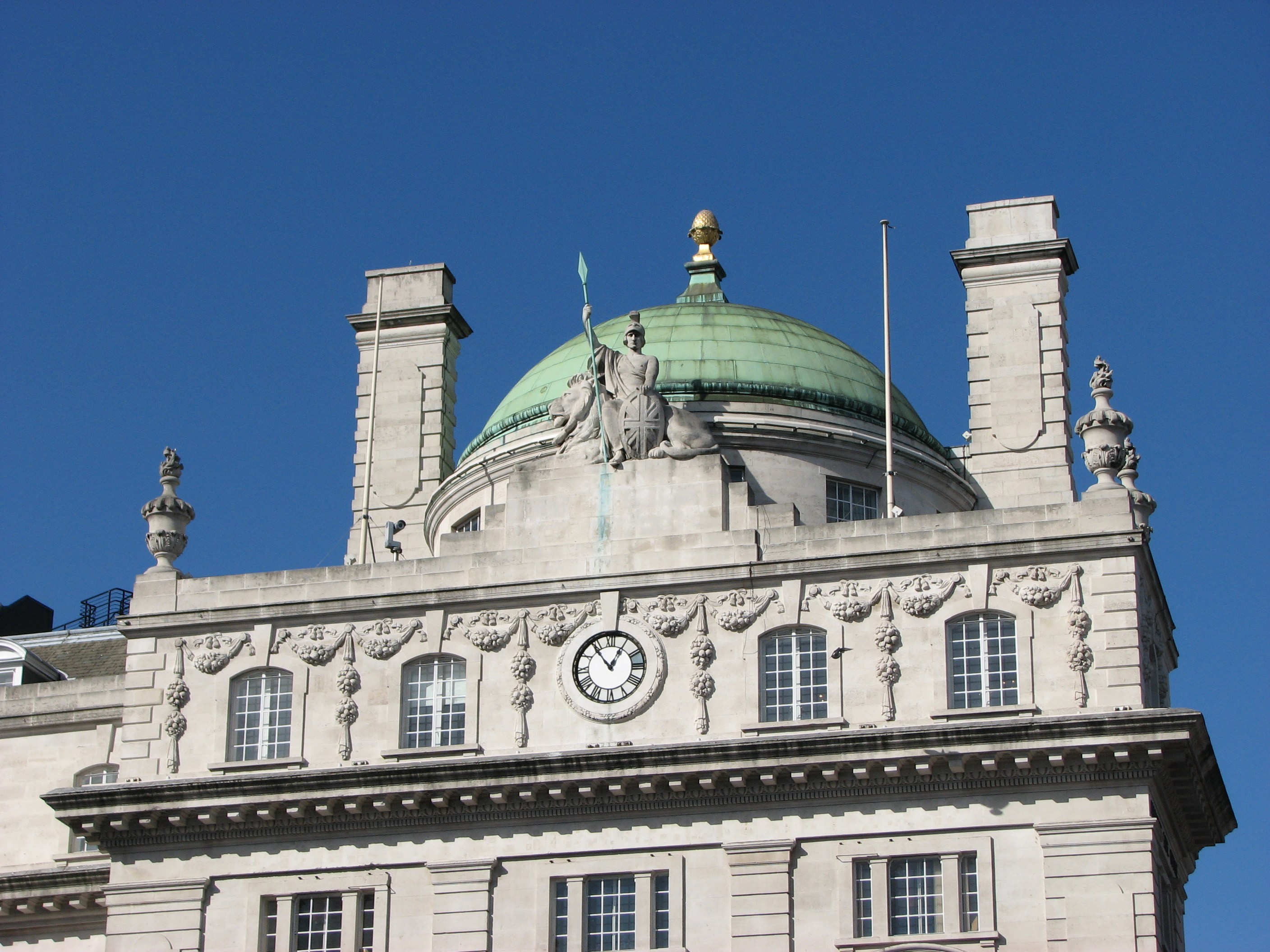 London